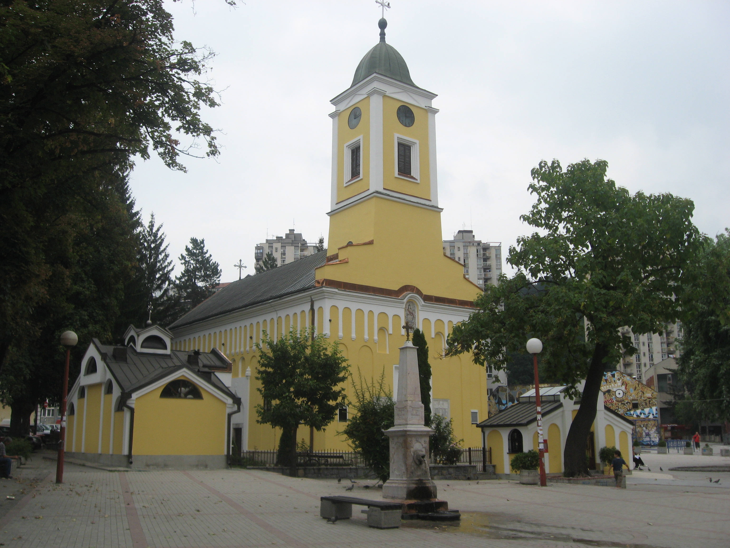 данашњи изглед цркве Св.Ђорђа у Ужицу сликано: 23.август 2009. аутор Марко Крстовић